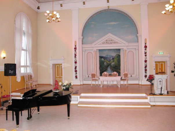 Interiør fra Baptistkirken i Trondheim